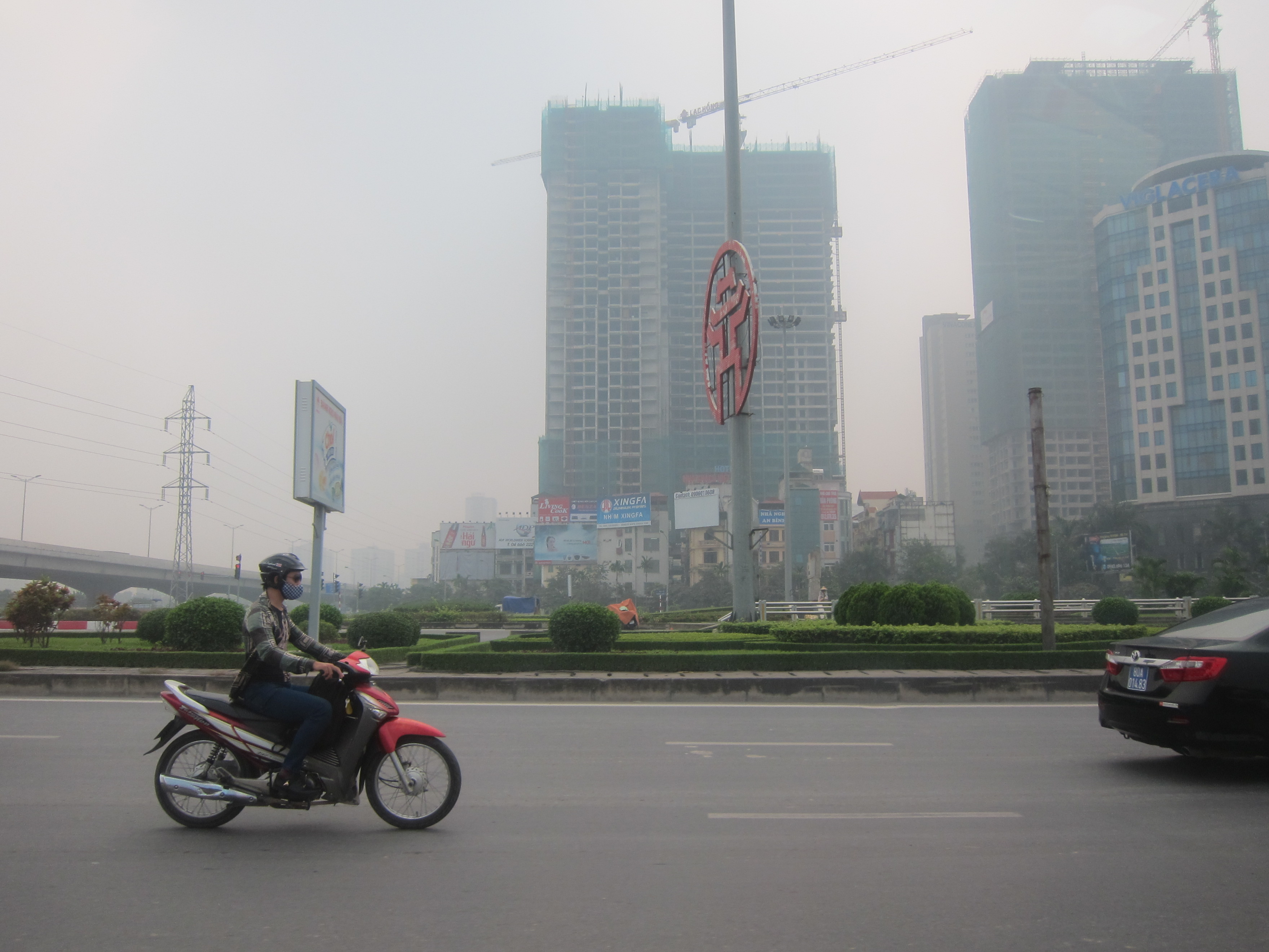 Đại lộ Thăng Long (trong ranh giới giữa quận Cầu Giấy và huyện Từ Liêm, thành phố Hà Nội)